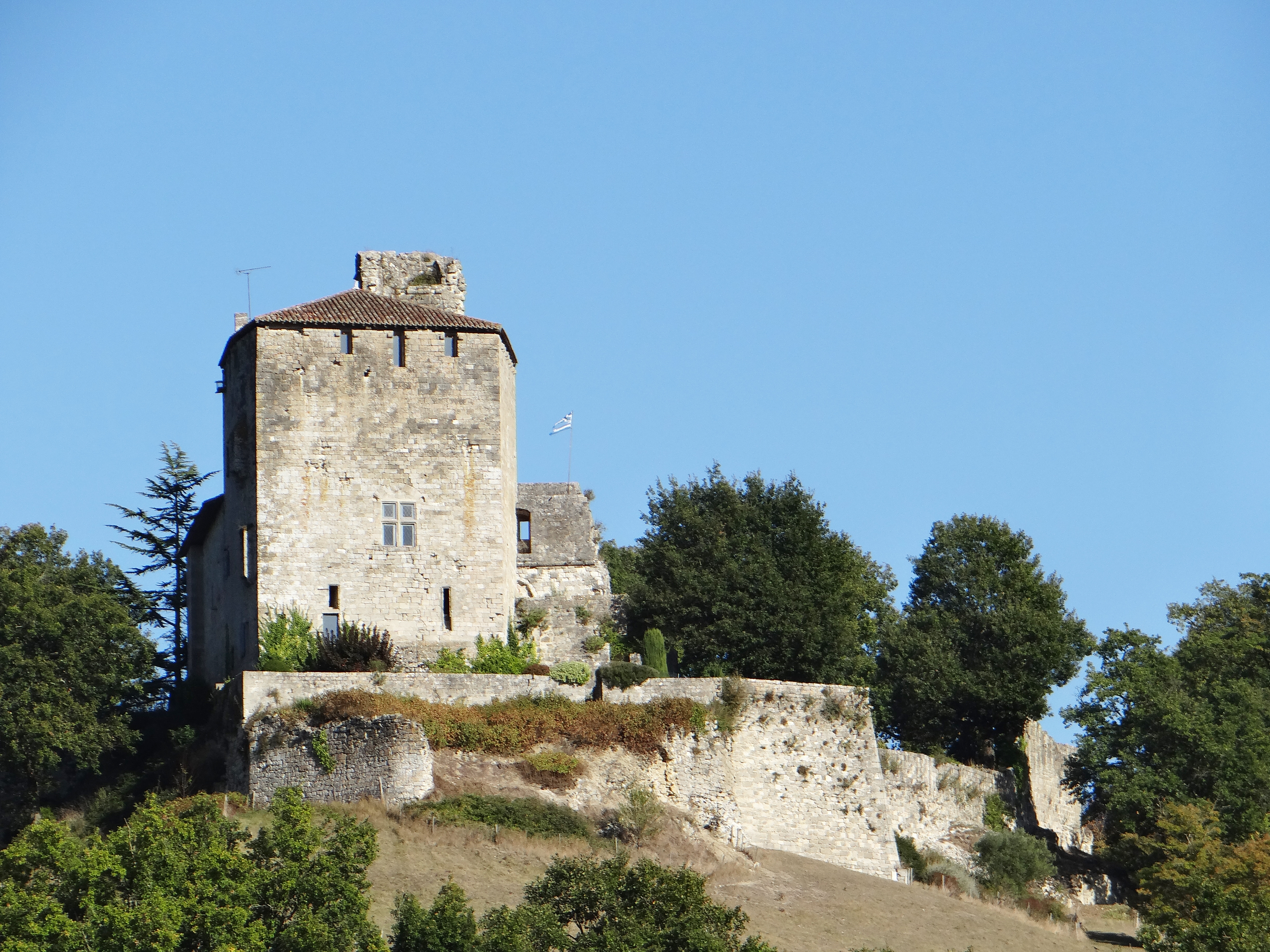 Château de Madaillan - Ensemble du côté ouest